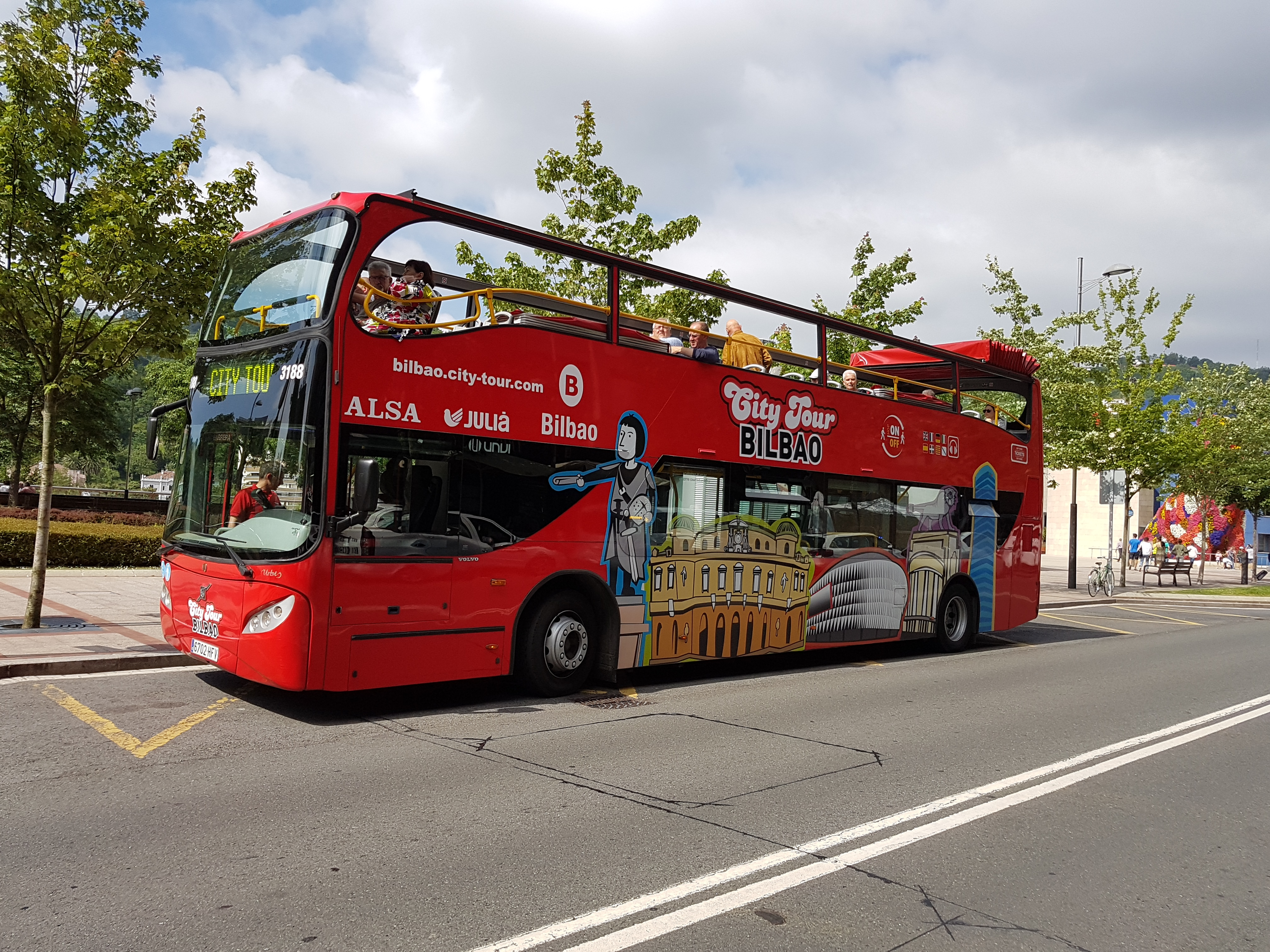 Bilbao City Tour, bus turístico de la villa de Bilbao.